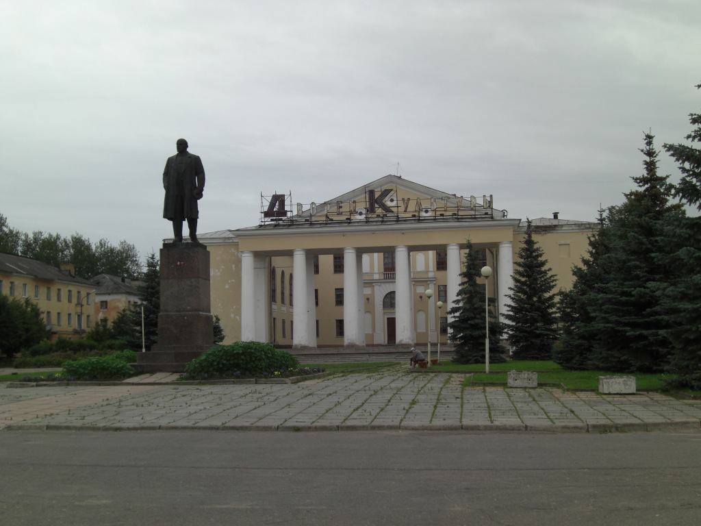 Площадь Ленина в Сланцах (Ленинградская область)